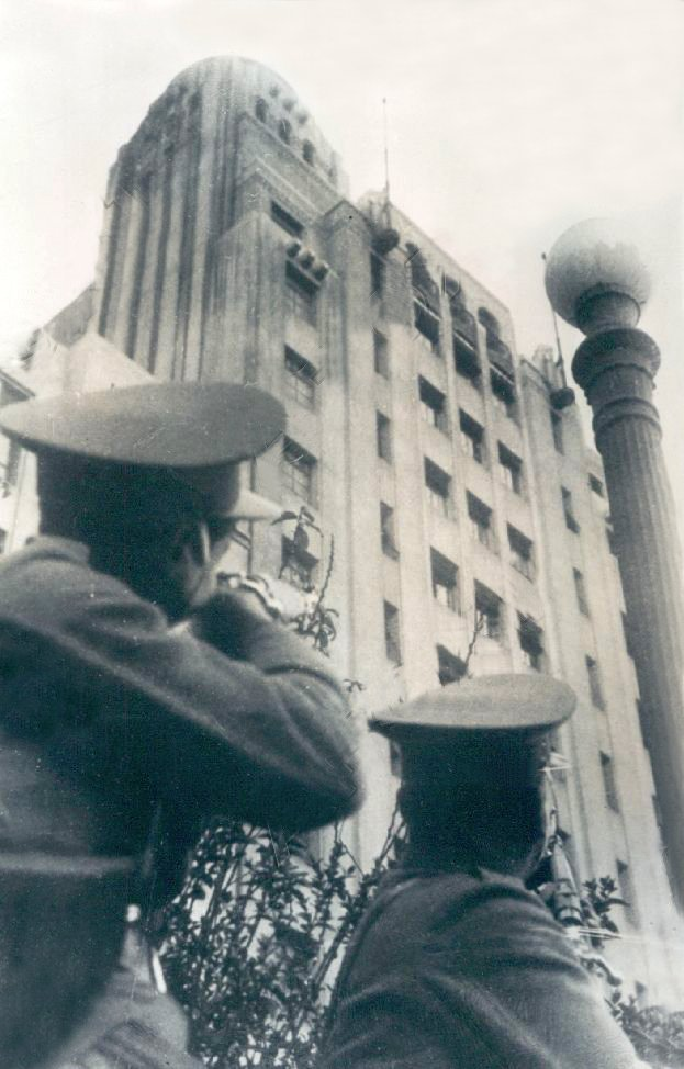 Carabineros apuntan hacia el edificio del Seguro Obrero durante la Masacre del Seguro Obrero del 5 de septiembre de 1938.